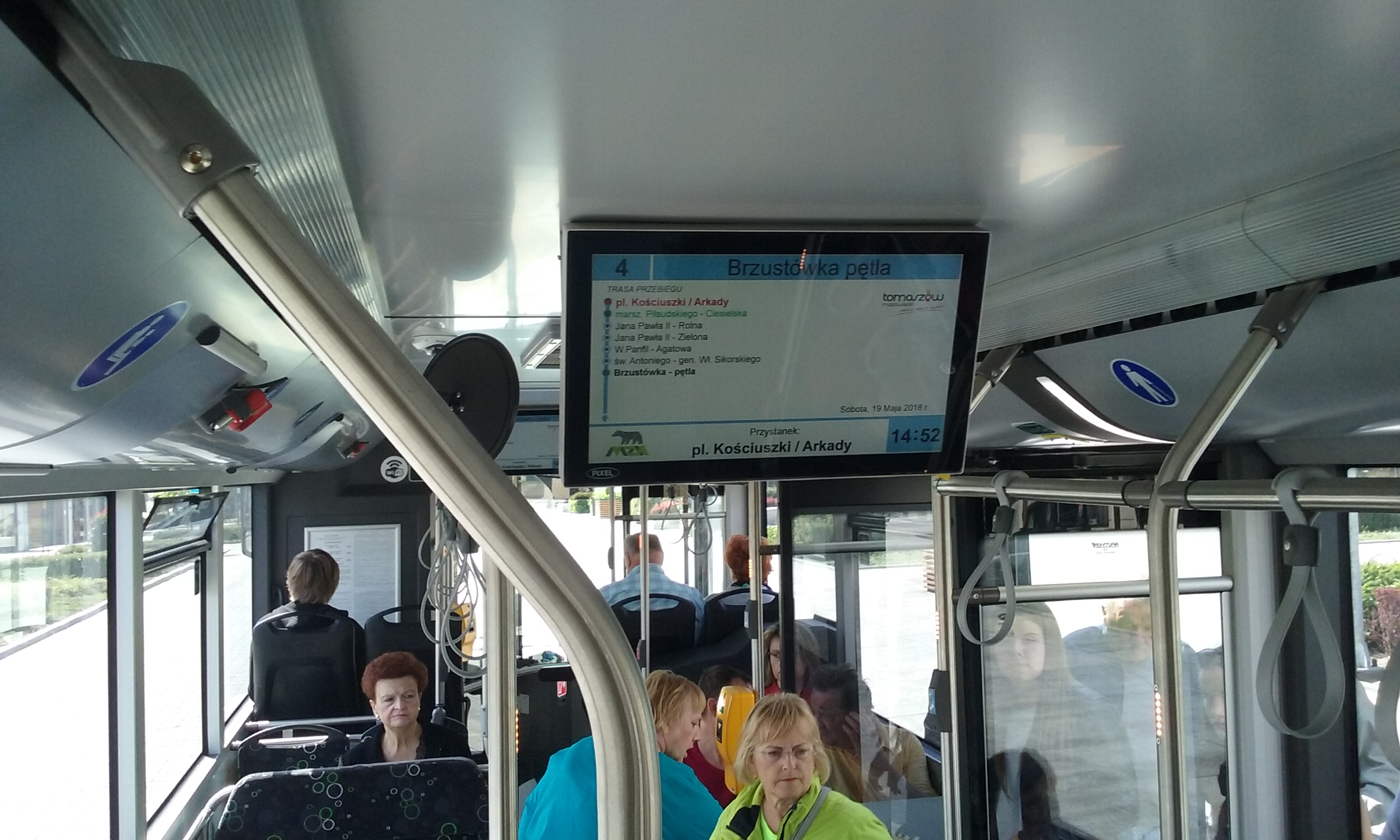 Wyświetlacz ledowy w jednym z autobusów hybrodowych Solaris Urbino 12 zakupionych przez PiS dla tomaszowskiego Miejskiego Zakładu Komunikacyjnego w 2017 roku